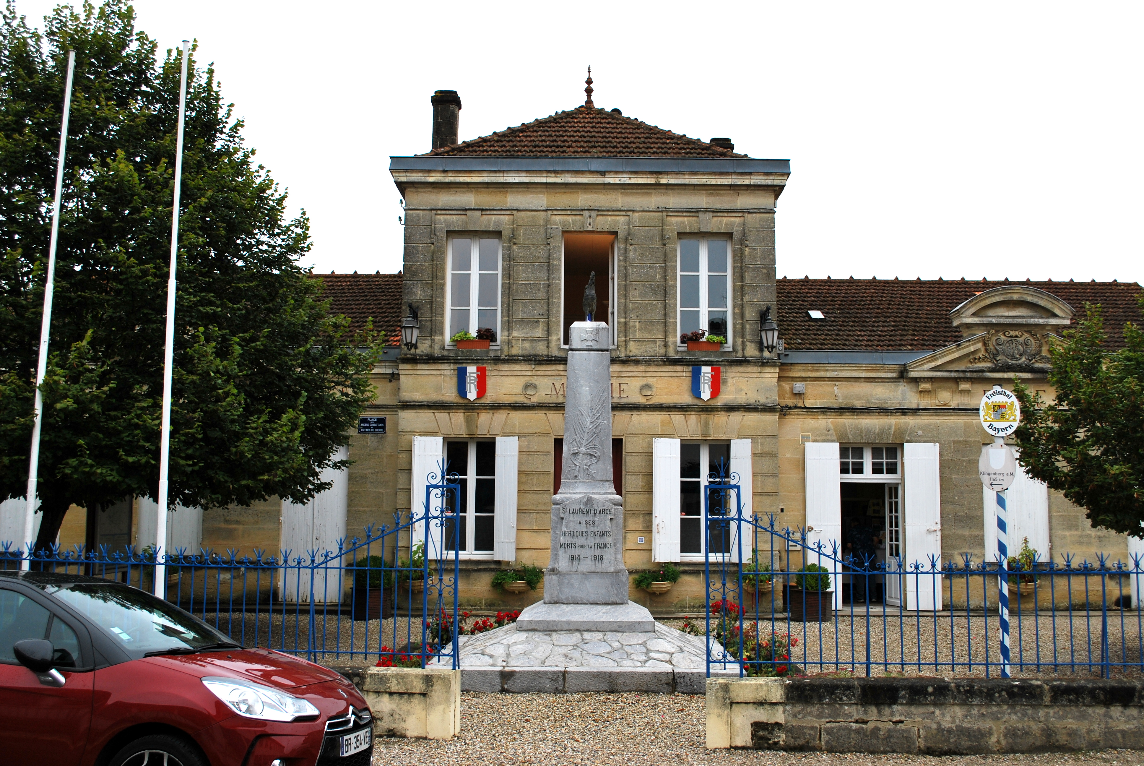 Saint-Laurent-d'Arce